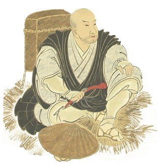 菊池武士の肖像。